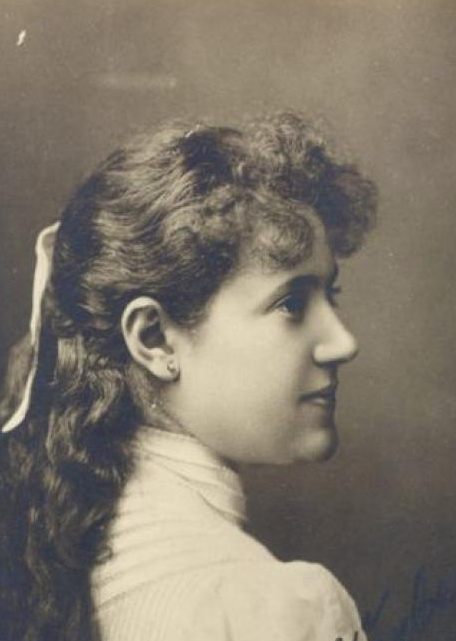 Porträt der Theaterschauspielerin Gisela Jurberg (Ausschnitt)